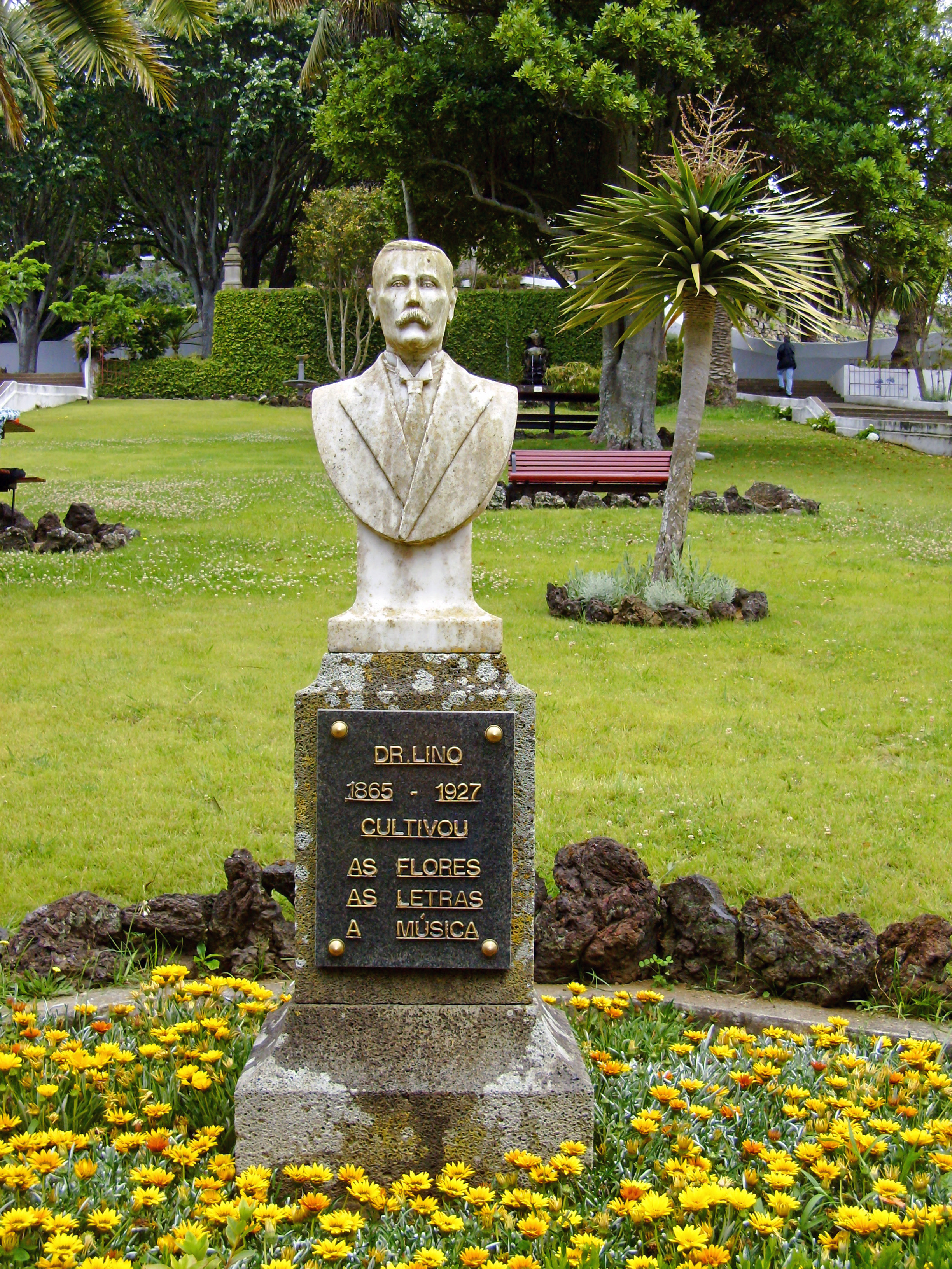 Jardim Duque da Terceira, Angra do Heroísmo, Ilha Terceira, Açores: busto do Dr. Manuel António Lino (1865-1927). Escultor: Francisco Matias.